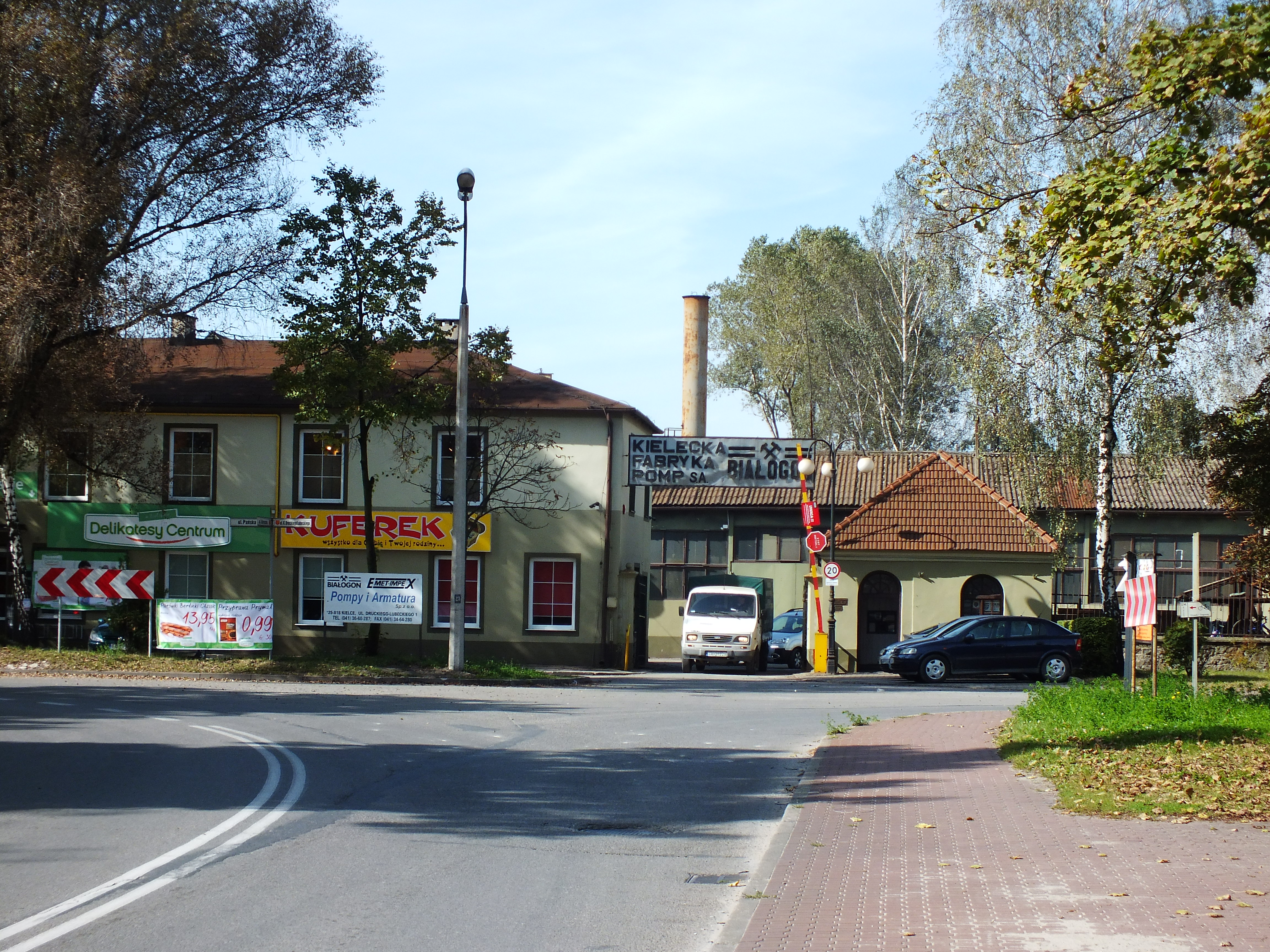 Kielce, zespół fabryczny d. Zakładów Białogońskich, obecnie KFP „Białogon”, wraz z osiedlem przemysłowym